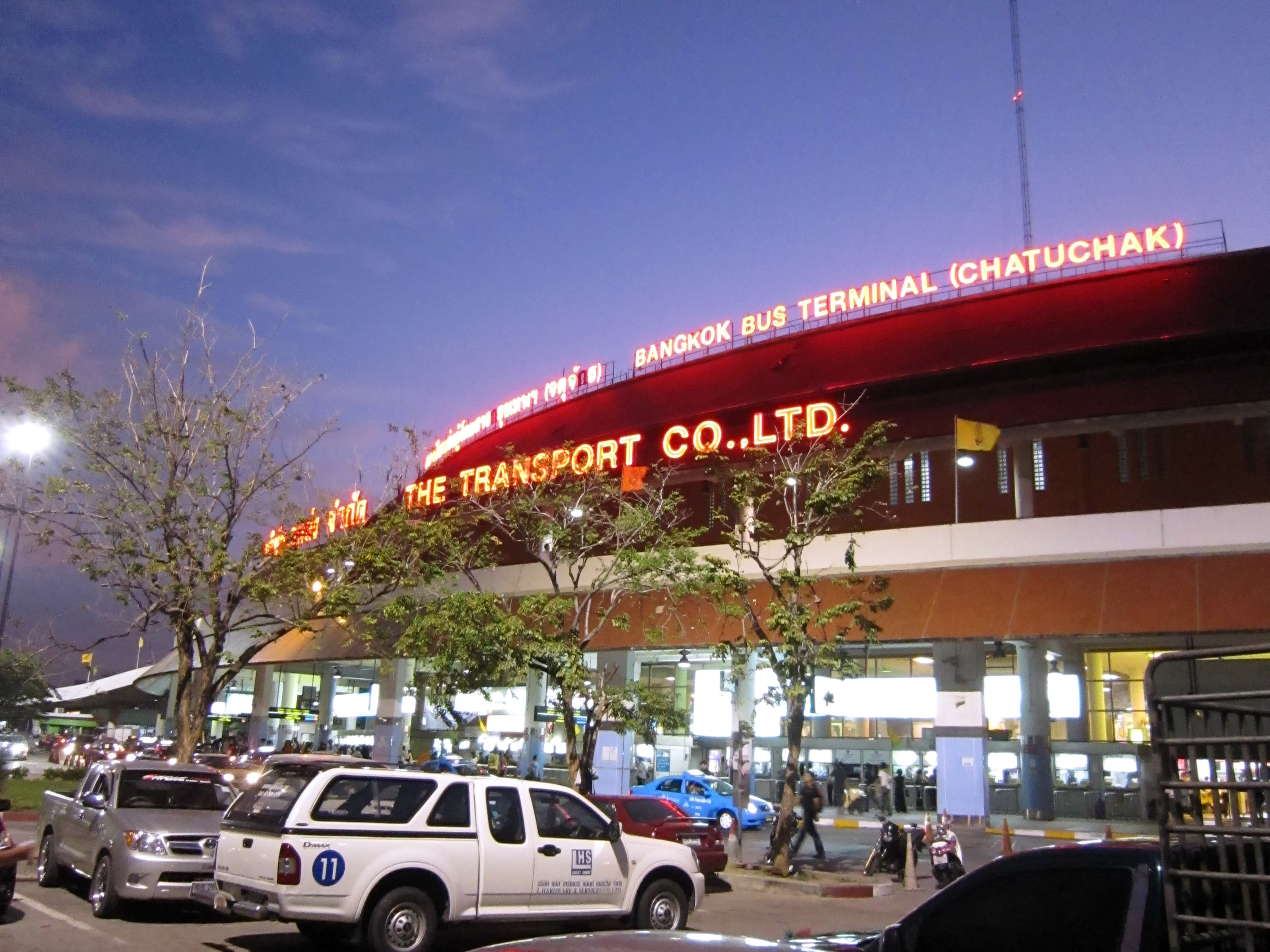 Bangkok Bus Terminal[Jartujak]3